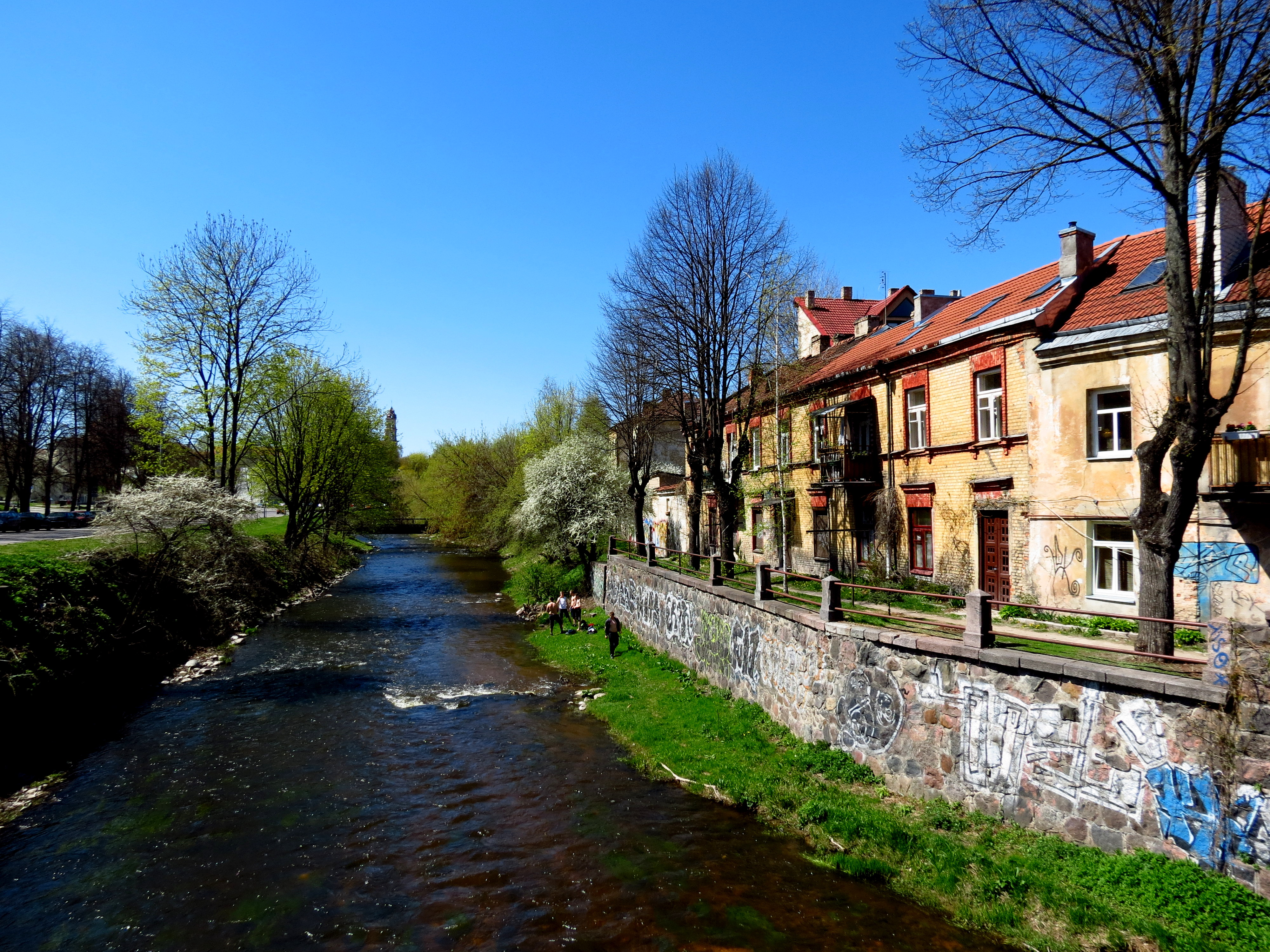 Vue de Vilnius.